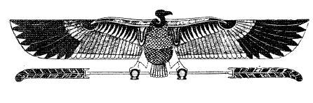 العقاب الفرعوني - الذي اشتهر استعماله في النقوش والزخرفة الفرعونية القديمة